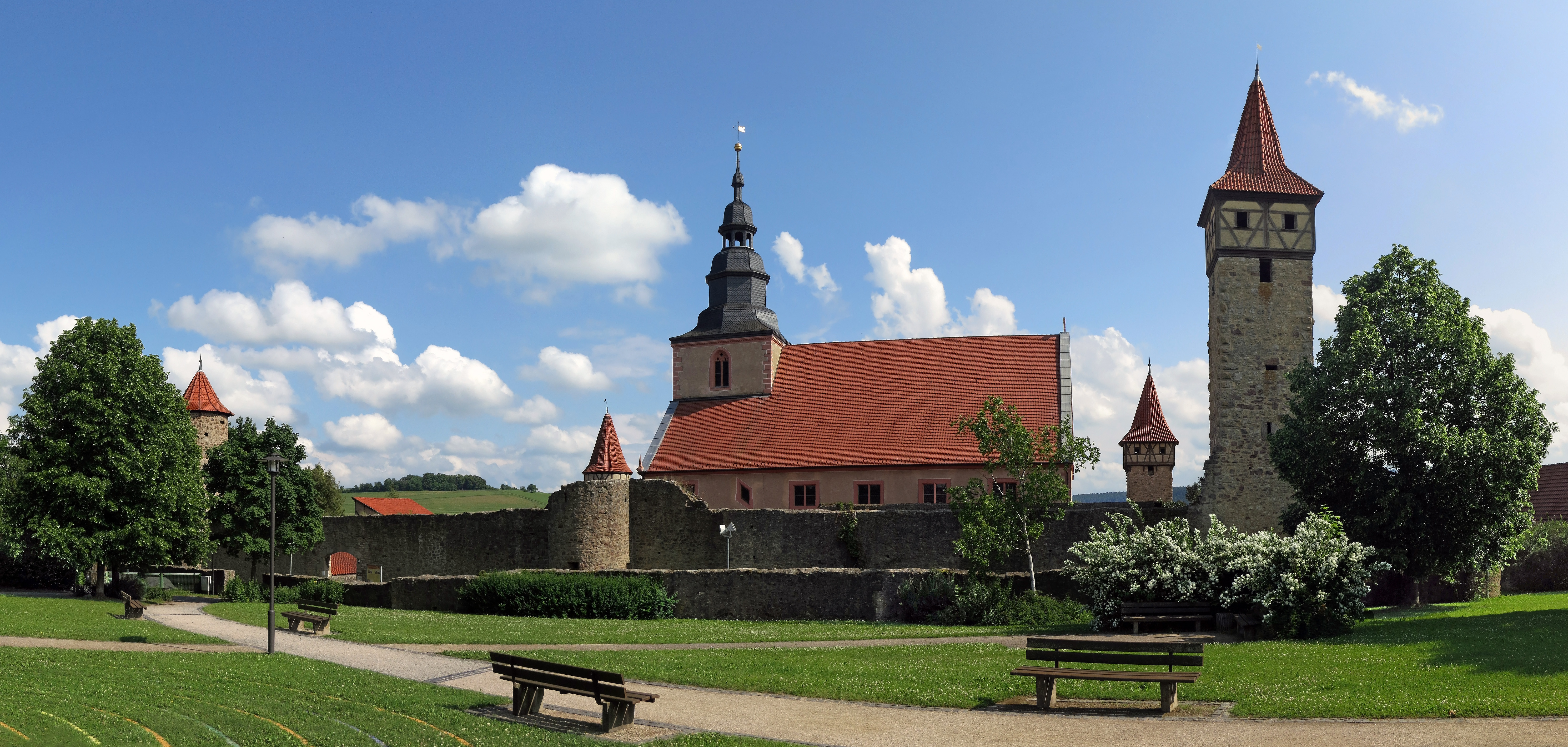 Die Kirchenburg Ostheim gilt mit einer Grundfläche von 75 mal 75 Metern als die größte und besterhaltene Kirchenburg in Deutschland. Die Kirchenburg liegt in der unterfränkischen Stadt Ostheim vor der Rhön im Landkreis Rhön-Grabfeld und ist ab 1400 entstanden. Die im 17. Jahrhundert erbauten Kirche wird von einer doppelten Ringmauer mit fünf Wehrtürme, die mit sechs Bastionen auf halber Mauerlänge verstärkt ist, umgeben.